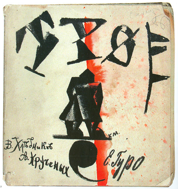 Обложка книги "Трое" Казимира Малевича